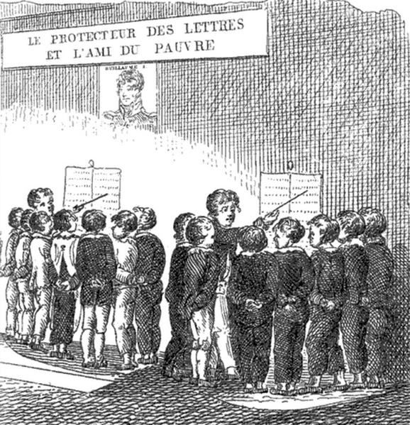 « Les enfants récitant aux cercles ». Un moniteur fait travailler des enfants devant des tableaux muraux.